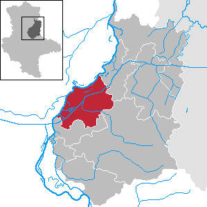 Burg im Landkreis Jerichower Land, Sachsen-Anhalt